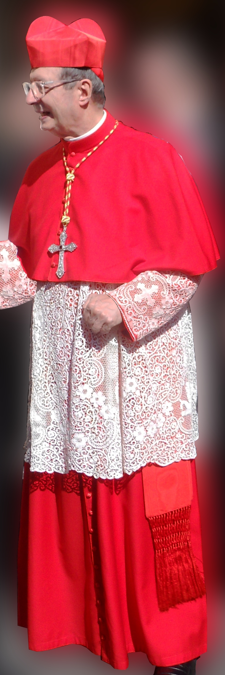 Giovanni Cardinal Lajolo